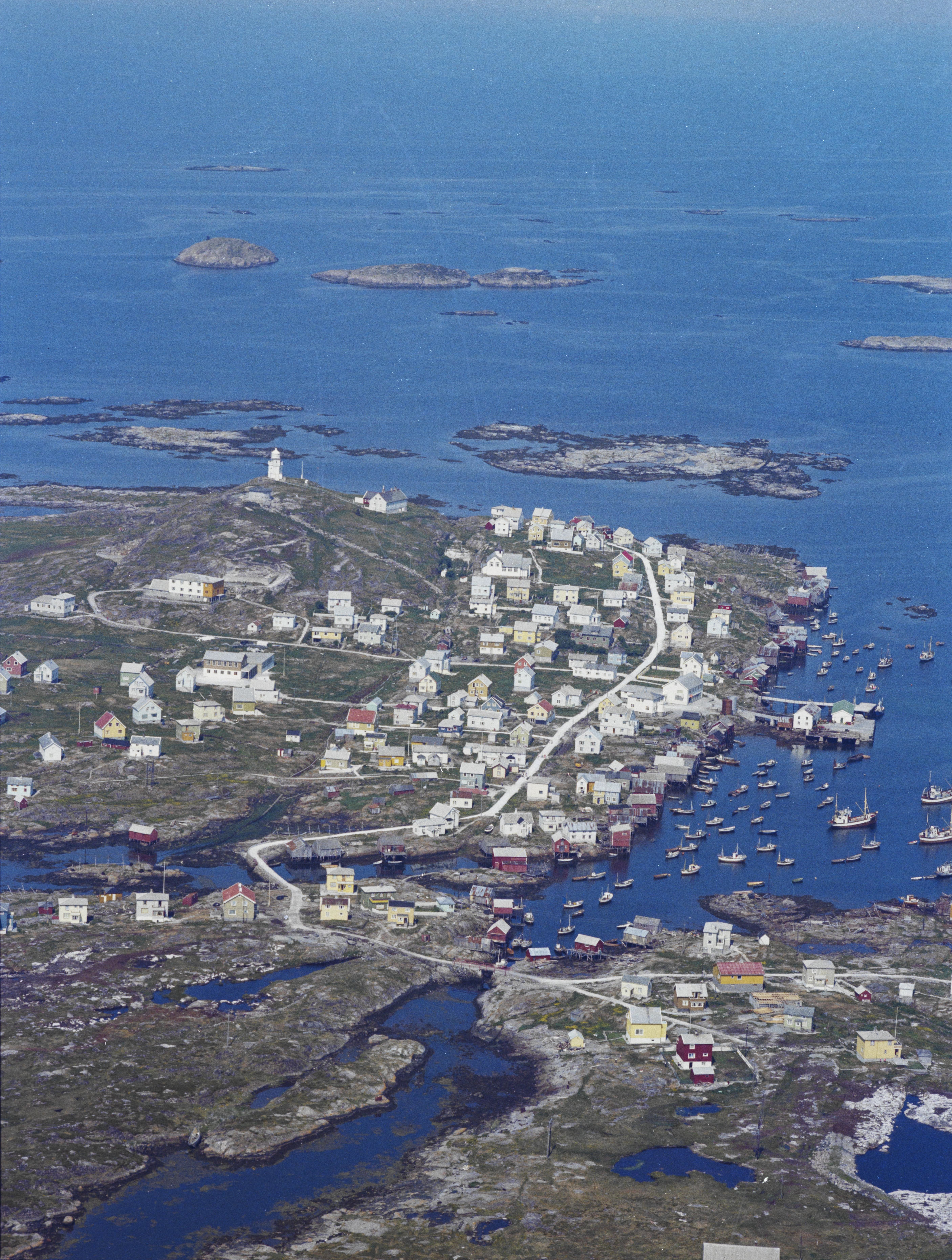 Sula i Frøya kommune i Sør-Trøndelag fylke.